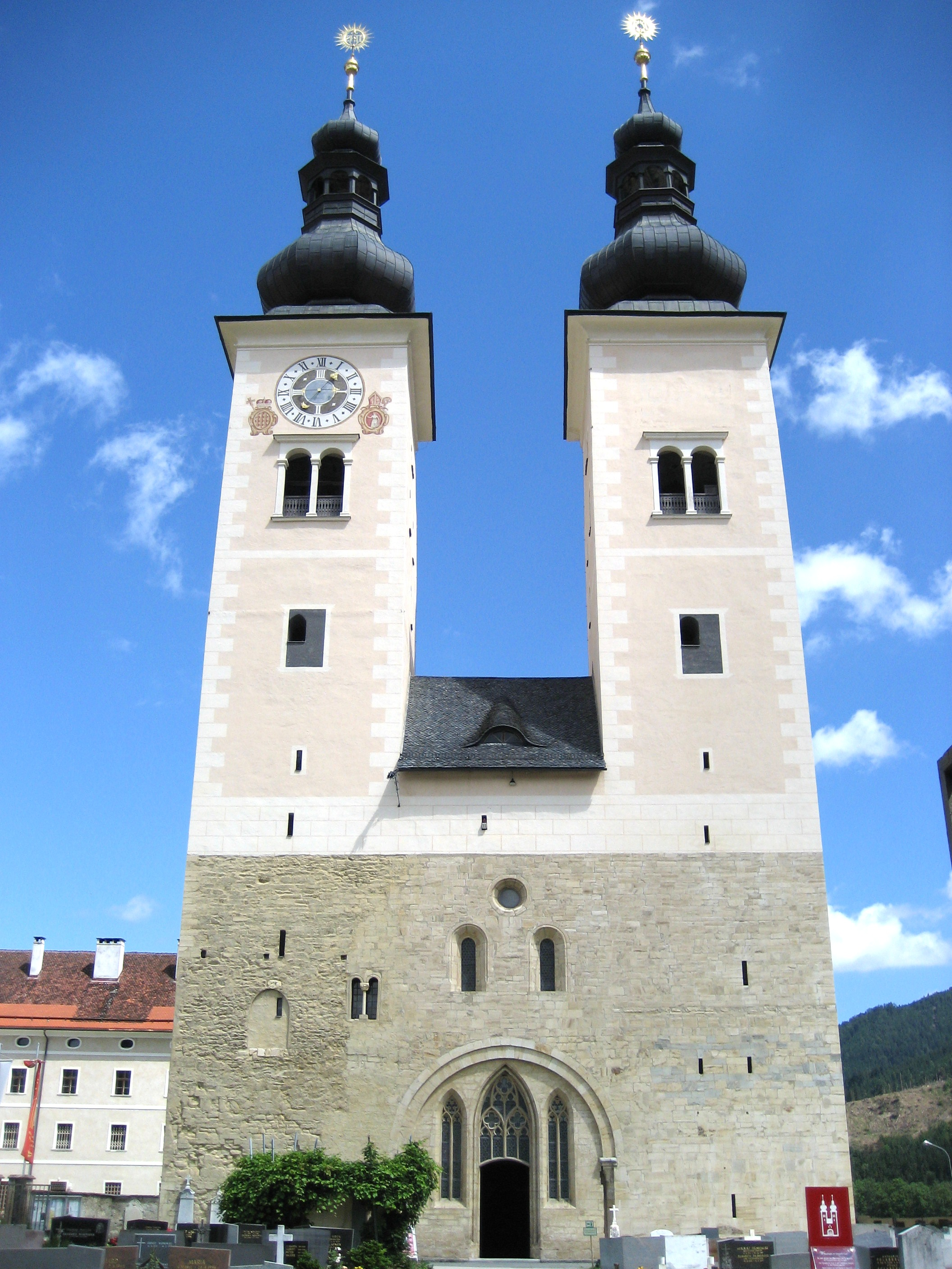 Dom zu Gurk, das bedeutendste romanische Bauwerk in Österreich, Fassade (Gurk Cathedral)